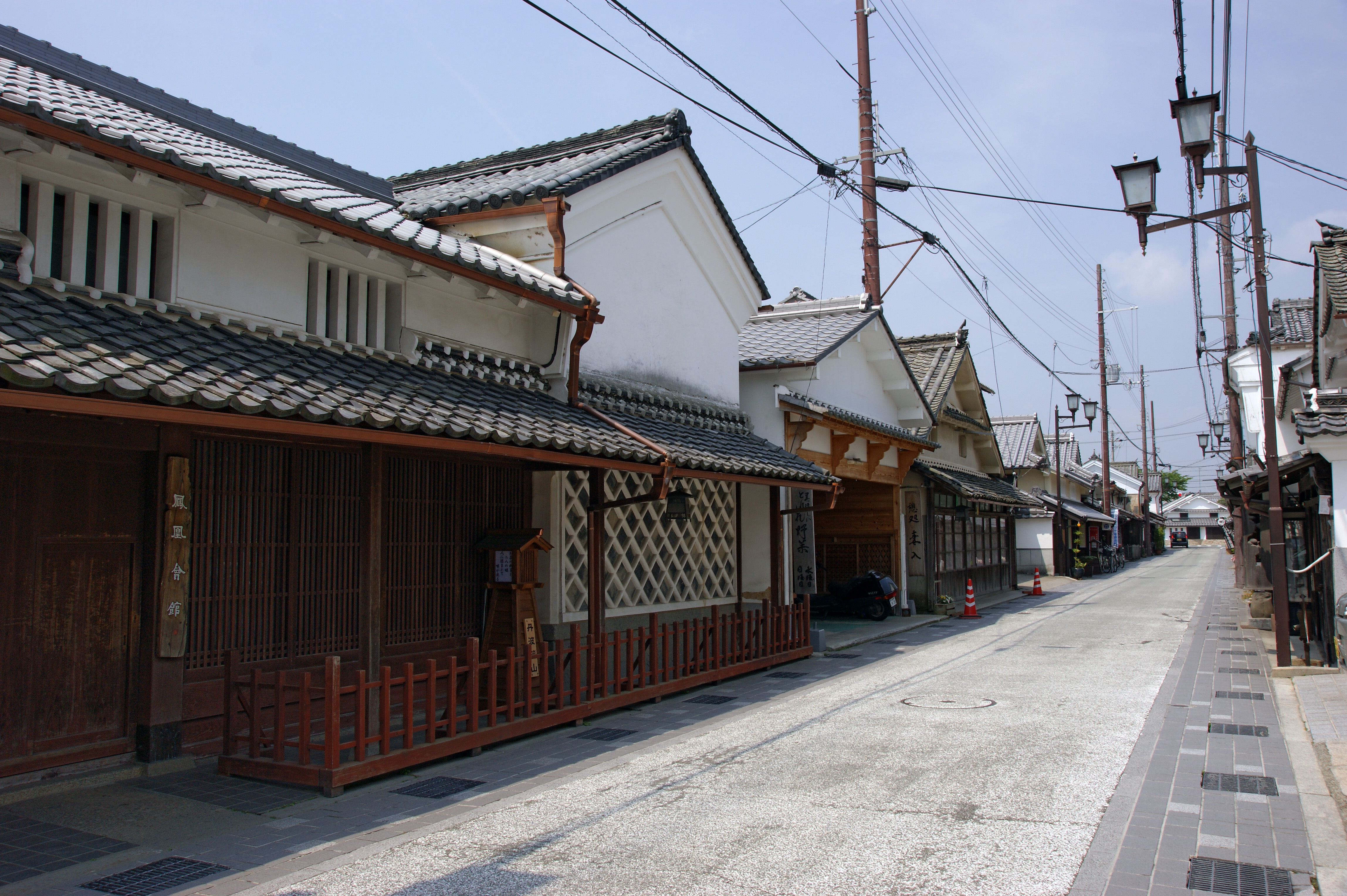 Kwara-machi in Sasayama, Hyogo prefecture, Japan